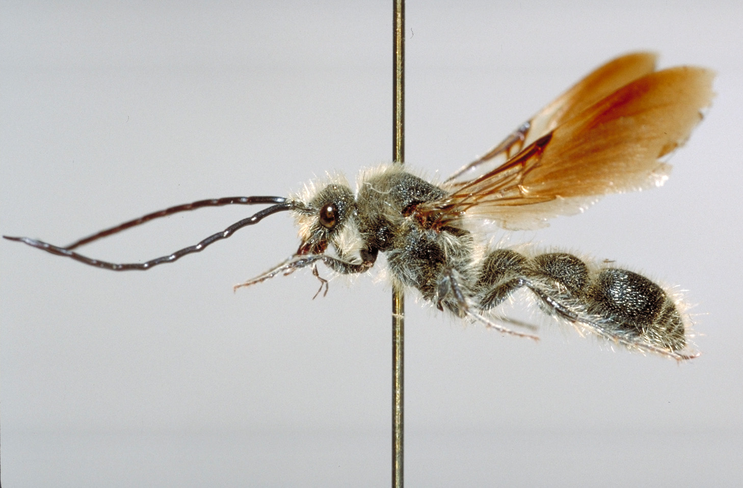 Bradynobaenus spec. male (South Africa) Bradynobaenidae